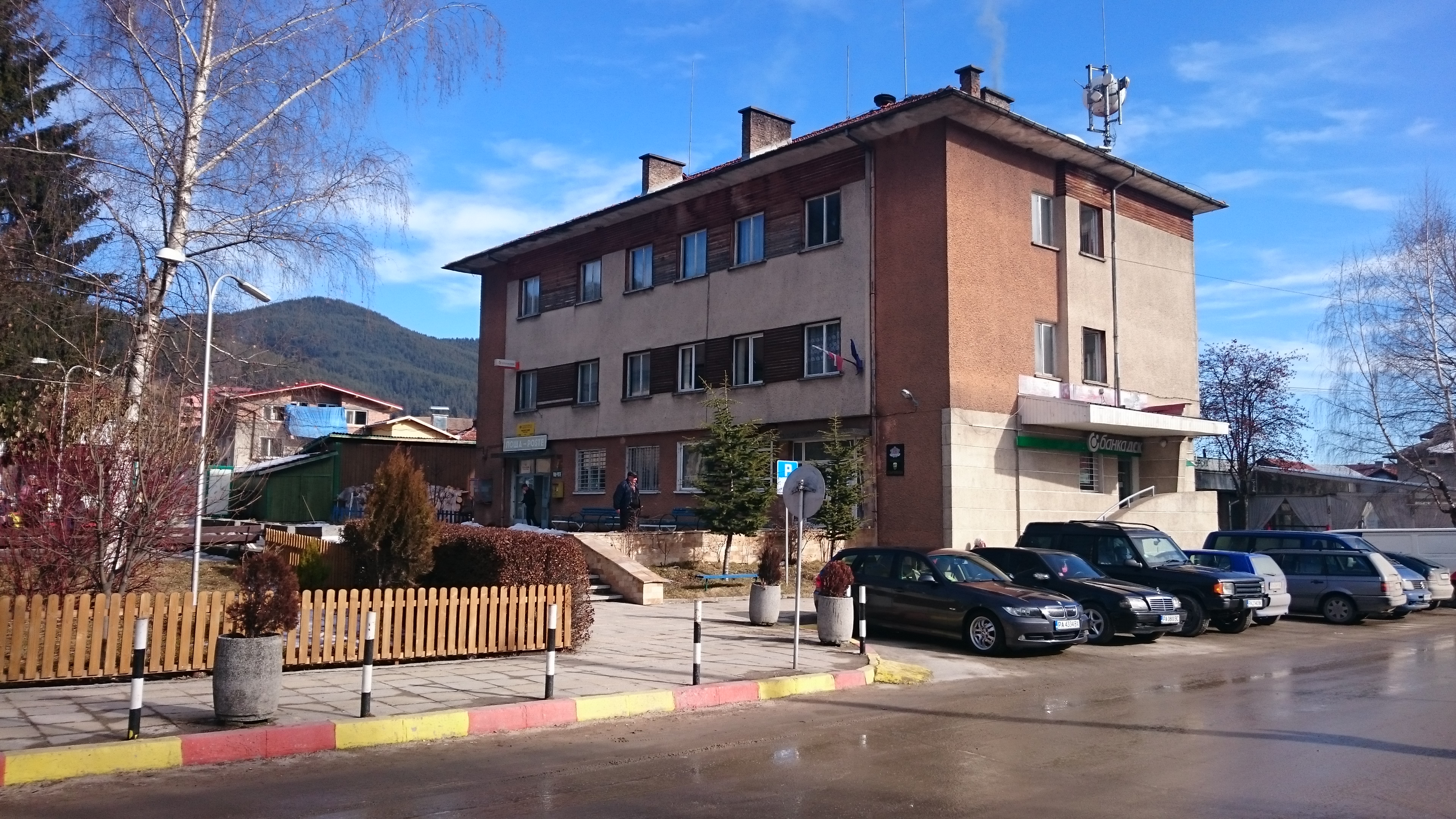 Административна сграда на община Сърница